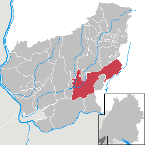 Schopfheim, Landkreis Lörrach, Baden-Württemberg